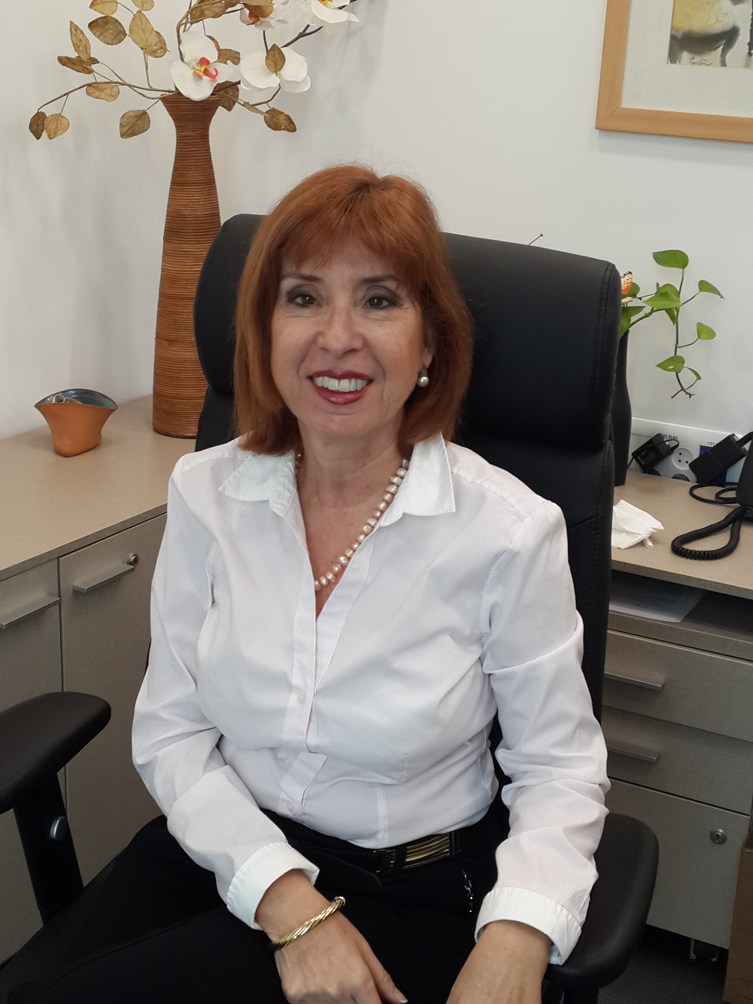 כב' השופטת ד"ר דפנה אבניאלי.